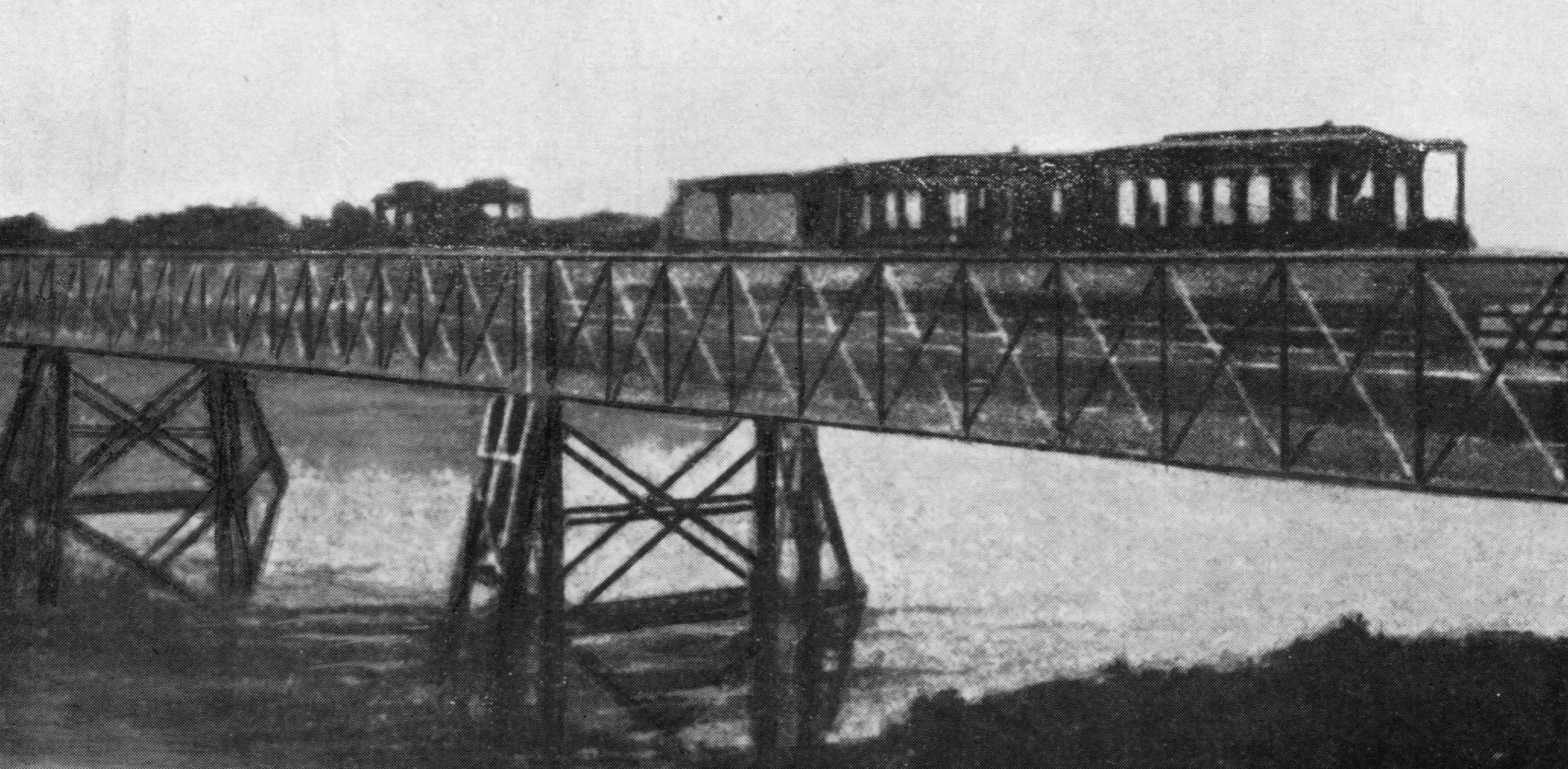 Foto storica del tram della tranvia "Verona-Albaredo-Coriano" durante il passaggio del ponte di Albaredo.